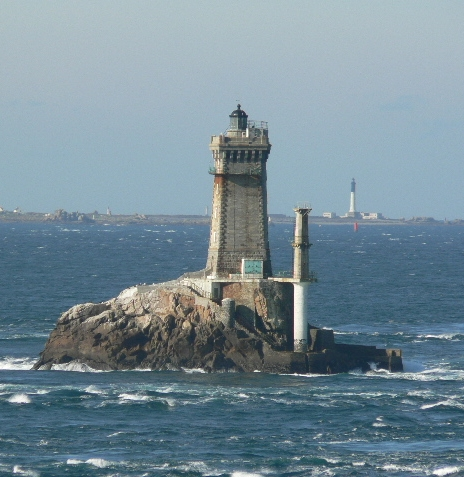 La pointe du Raz (vue sur le Phare de la Vieille), Finistère (Bretagne), France